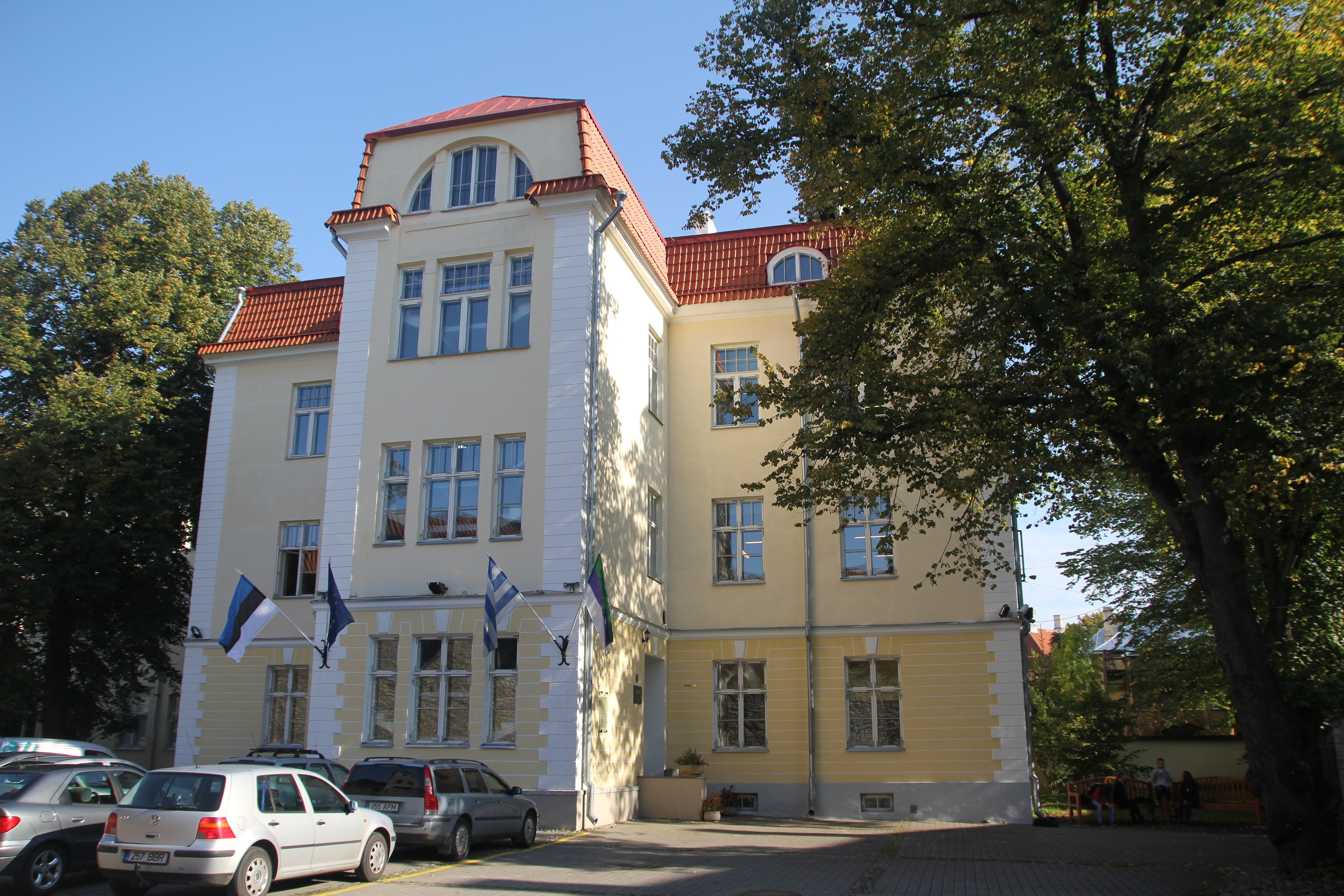 Tallinna tsistertslaste Mihkli kloostri ehitised koolihoonega, 13.-20. saj. (tänapäeval tegutseb selles majas Gustav Adolfi Gümnaasium)